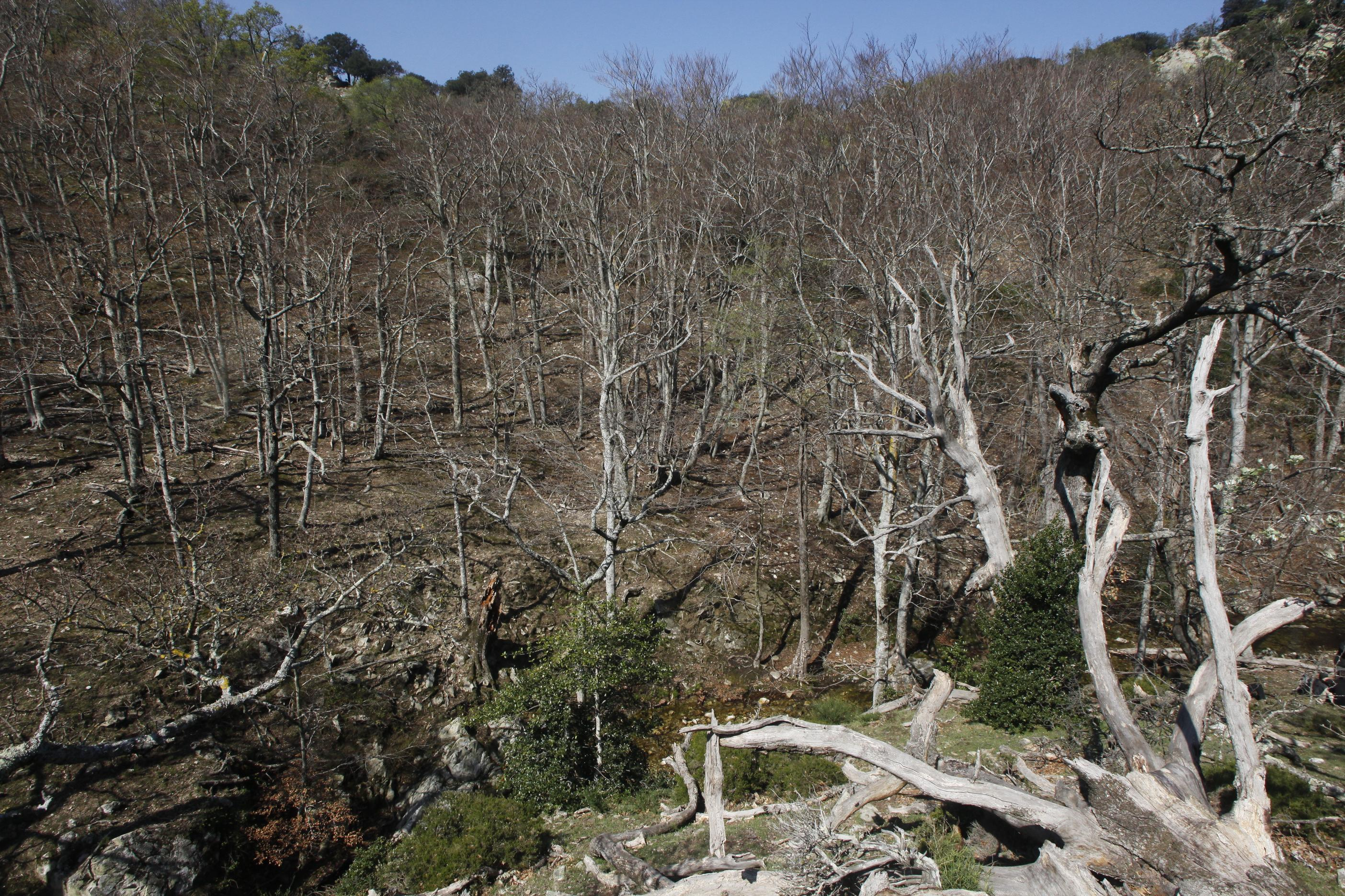 Vue du versant sud du vallon de la Massane